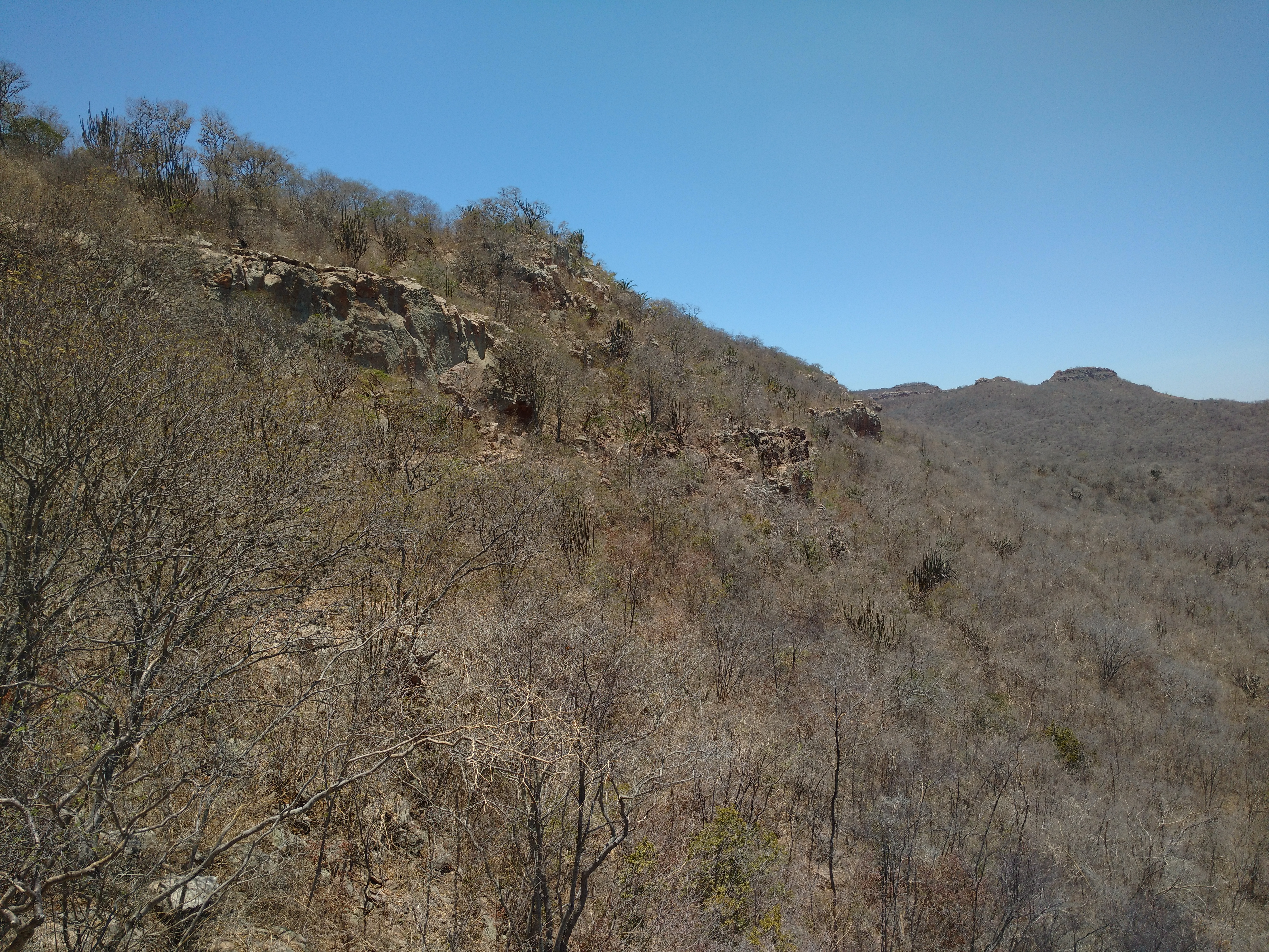 Serra das Letras, município de Flores-PE. Caatinga durante a seca, a verdadeira floresta branca.